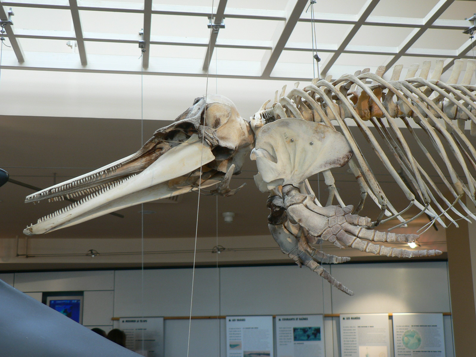 Musée de la Mer Biarritz